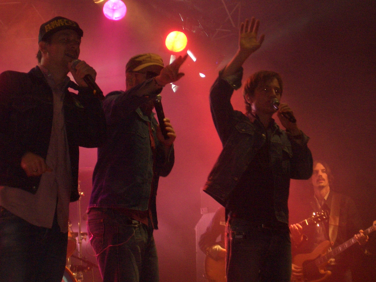 Schwuuuuuuuuuule Mädchen